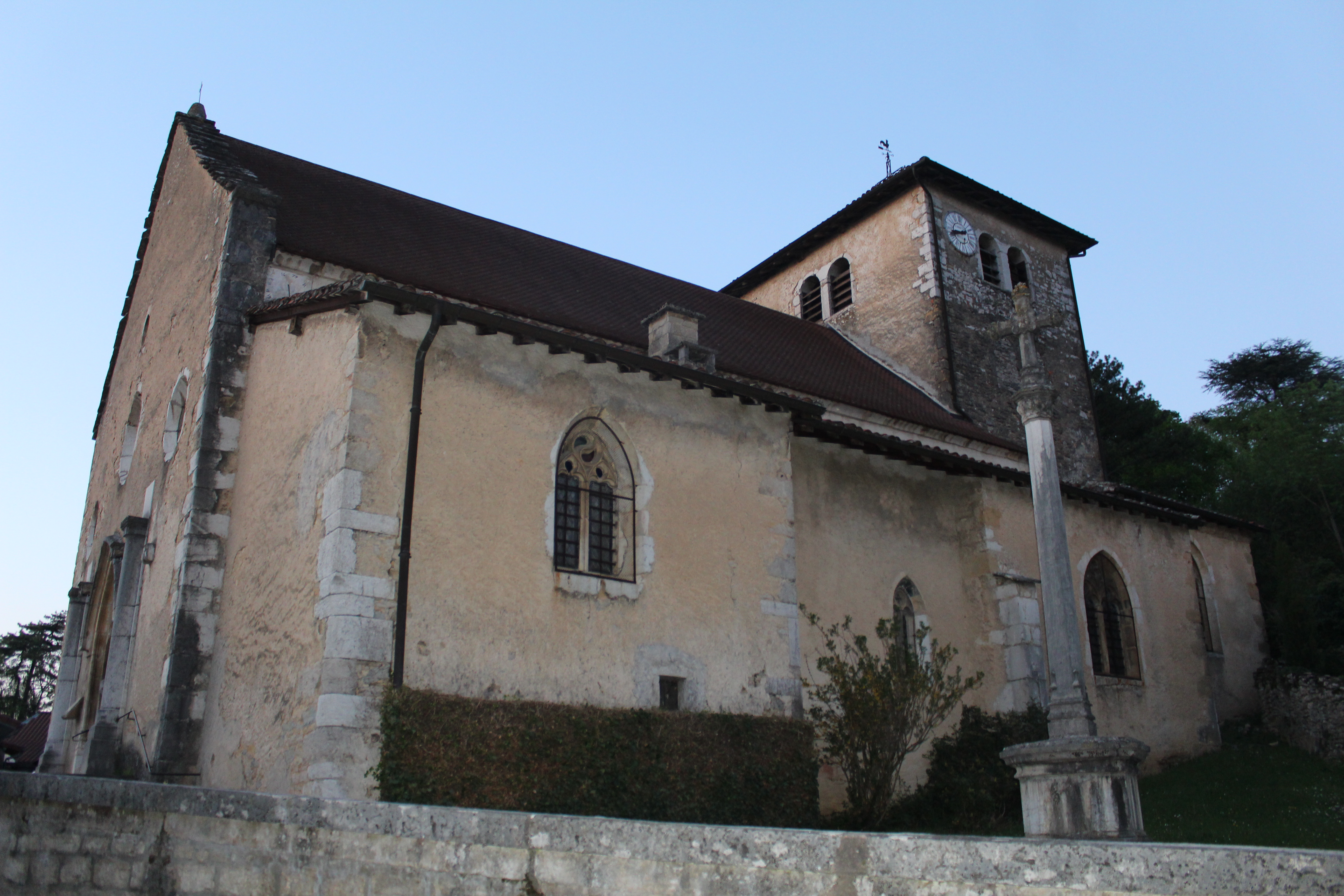 Église Saint-Jean-Baptiste de Jasseron.